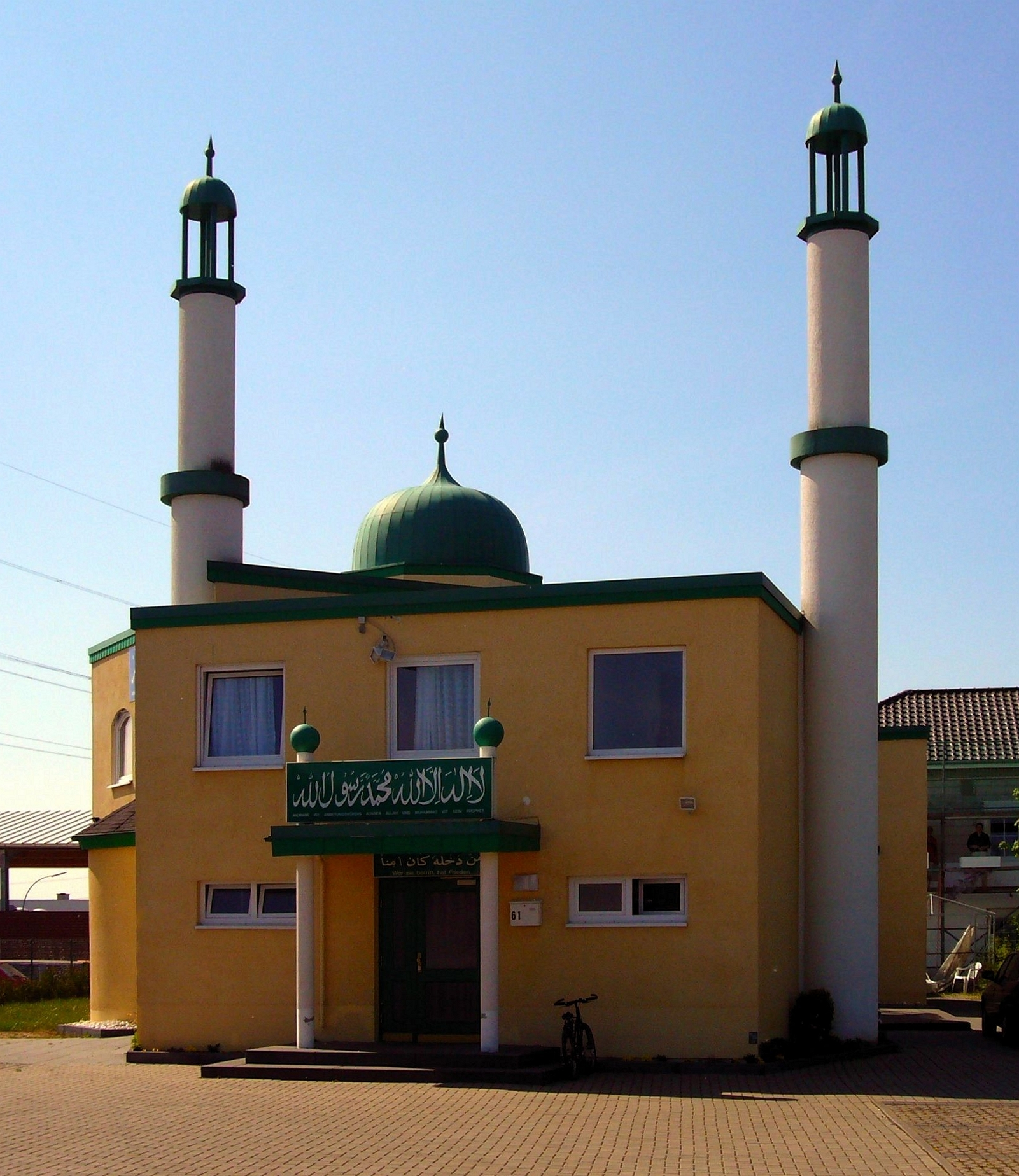 Erste Moschee in der Stadt Münster, Stadtteil Hiltrup. Die Bait-ul-Momin-Moschee wurde von der Ahmadiyya-Muslim-Jamaat gebaut